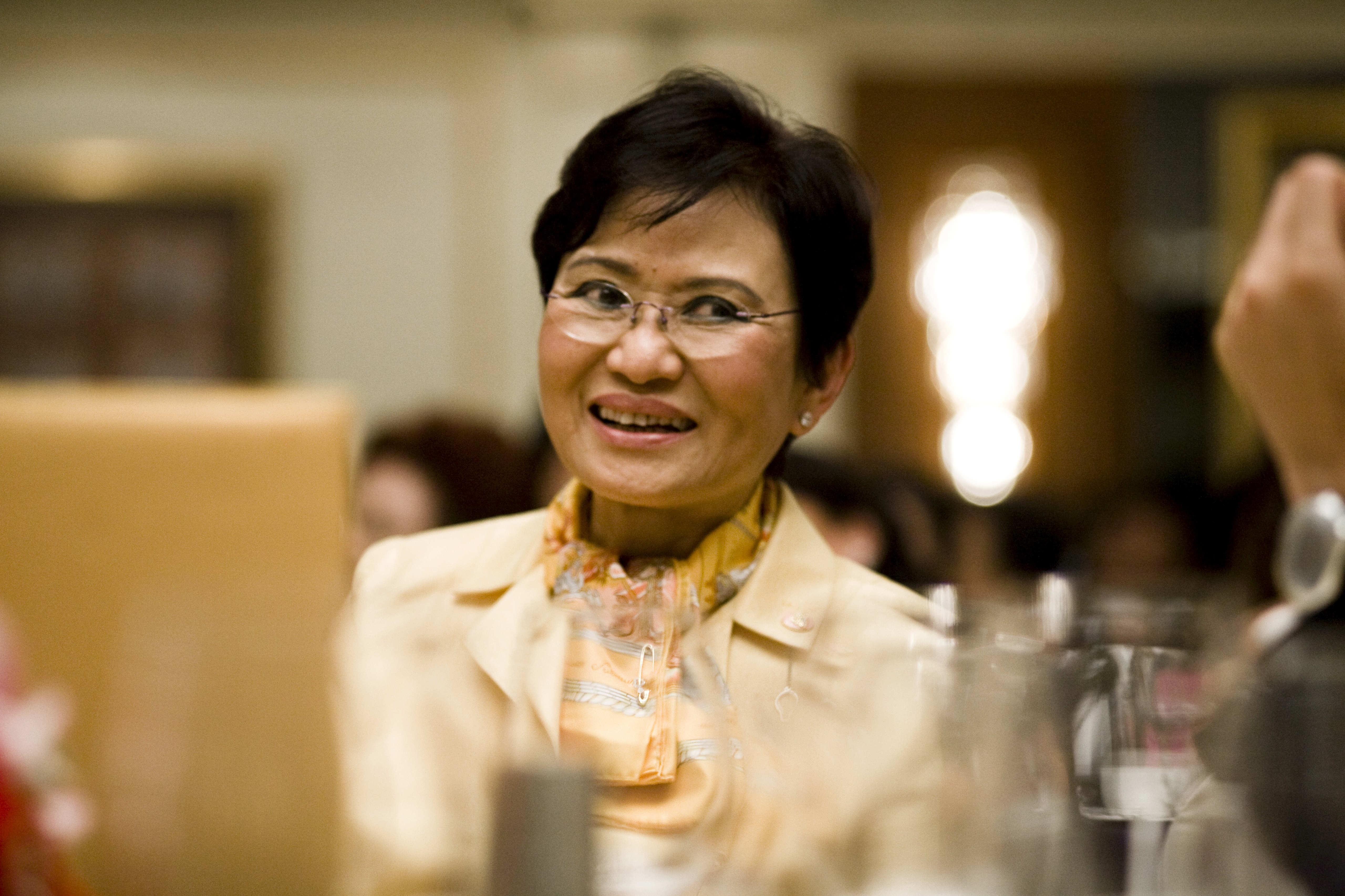 กัลยา โสภณพนิช / นายกรัฐมนตรี บรรยายพิเศษในหัวข้อ Towards the ASEAN Community ในงานเฉลิมฉลองการสถาปนามหาวิทยาลัย Bristol ครบ 100ปี และการก่อตั้งสมาคมนักเรียนเก่าอังกฤษฯ ครบ 75 ปี ณ ห้องดุสิตธานีฮอลล์ โรงแรมดุสิตธานี 14ธันวาคม2552 (The Official Site of The Prime Minister of Thailand Photo by พีรพัฒน์ วิมลรังครัตน์)